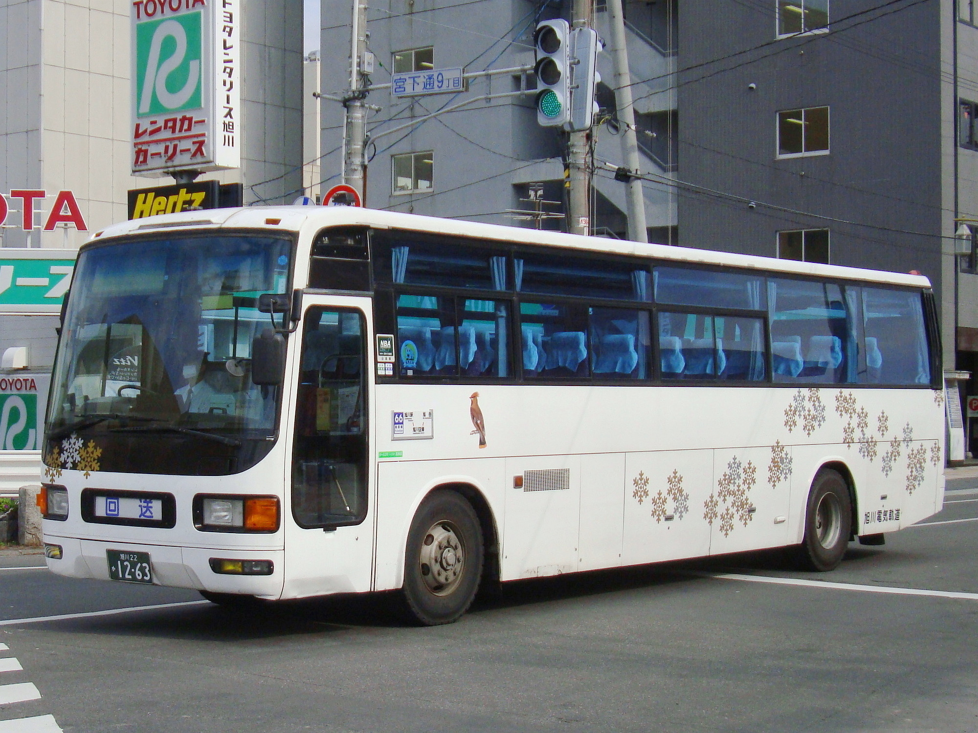 Asahidake Onsen to Asahikawa Station